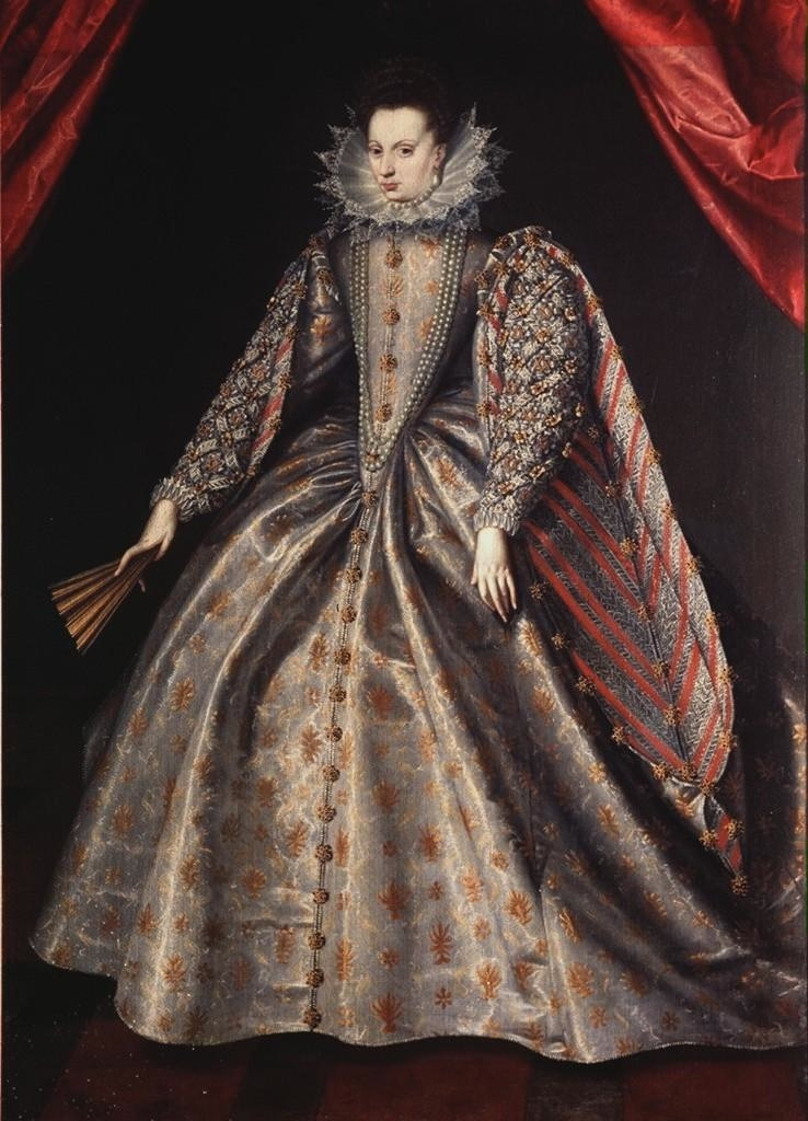 Elisabetta di Lorena (1574-1635), moglie di Massimiliano I di Baviera